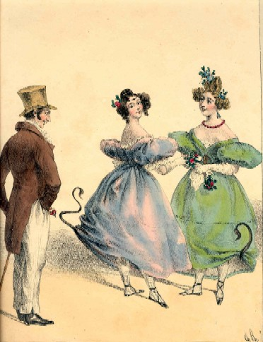 Aus: Charles Philipon: LES TENTATIONS DU DIABLE, (Karikaturen zu den "Versuchungen des Teufels" in Frauengestalt), Paris, Aubert, um 1830